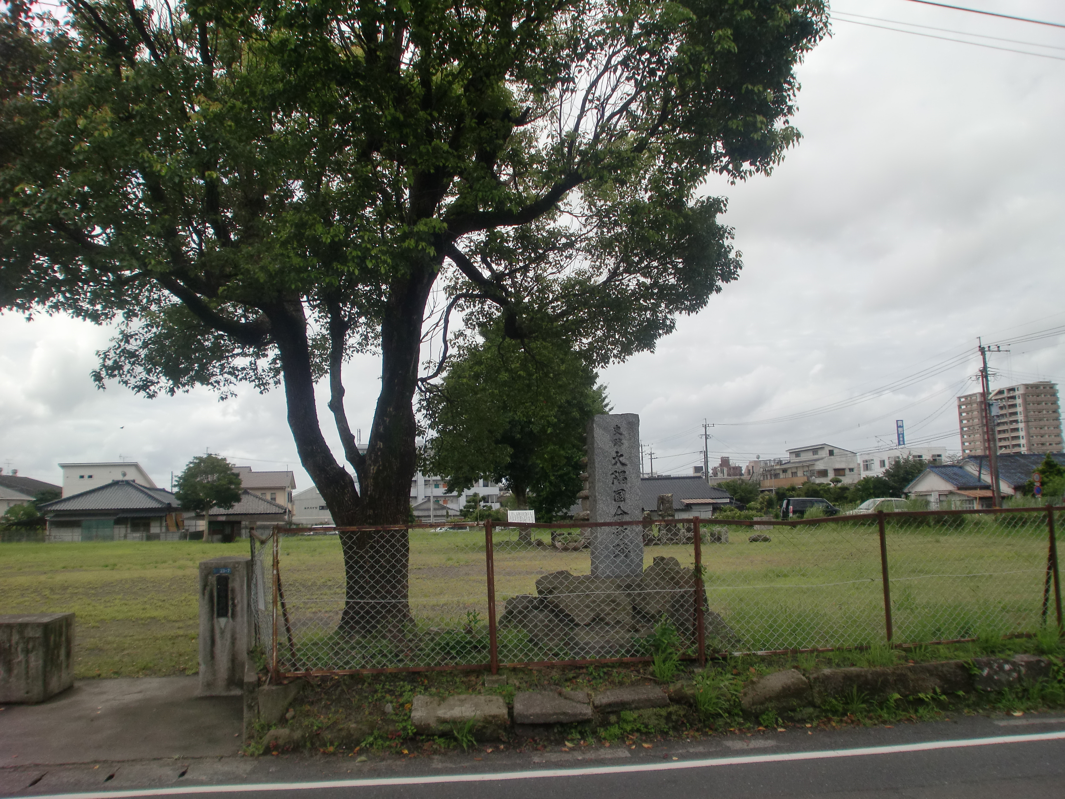 大隅国分寺跡の石碑。